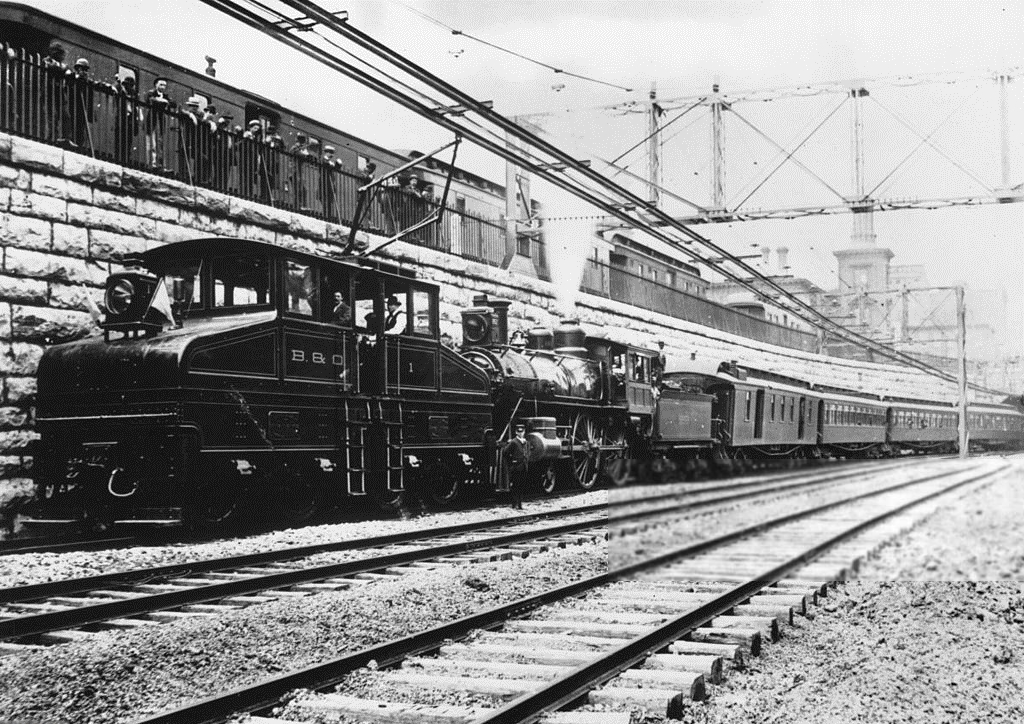 An electric locomotive hauling a passenger train through the Baltimore Tunnel on the Baltimore and Ohio line